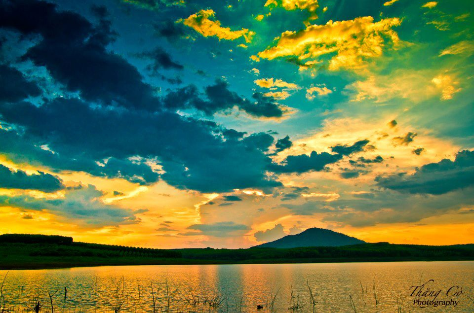 Một góc nhìn đẹp về núi Bà Rá